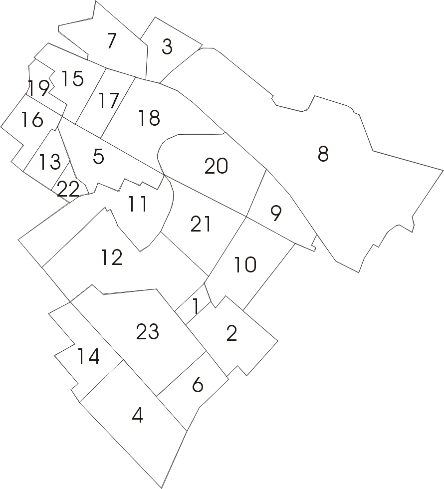 Budapest XVIII. kerületének városrészei